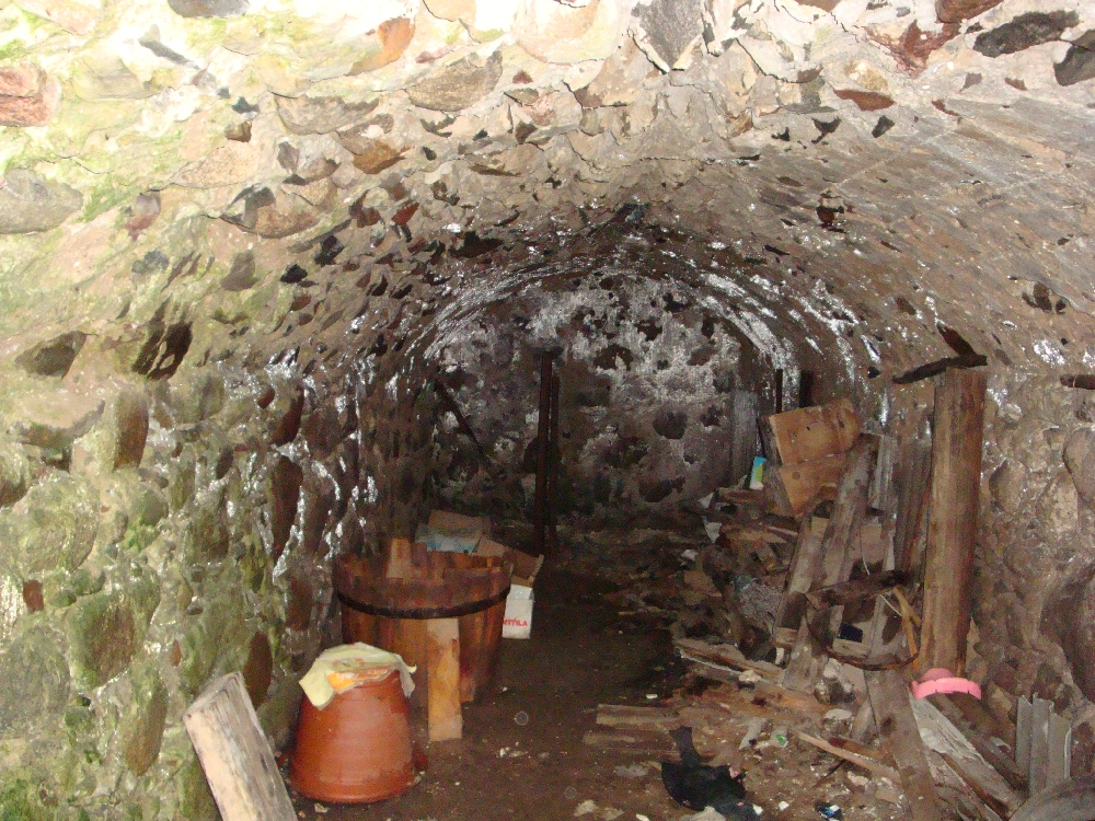 Linnusekünkas oleva võlvkeldri sisemus.